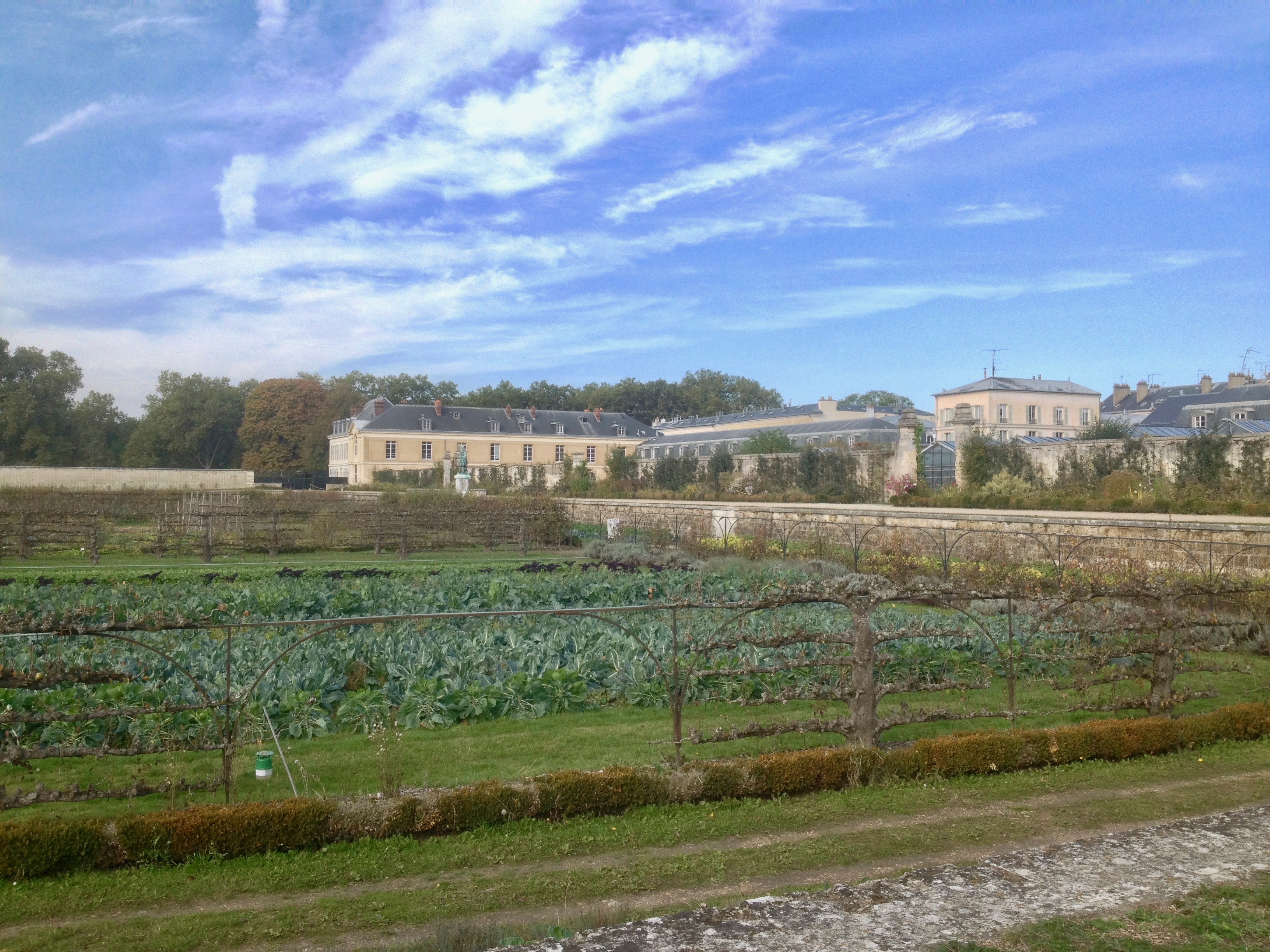 Le Potager du Roi, les carrés pour les légumes